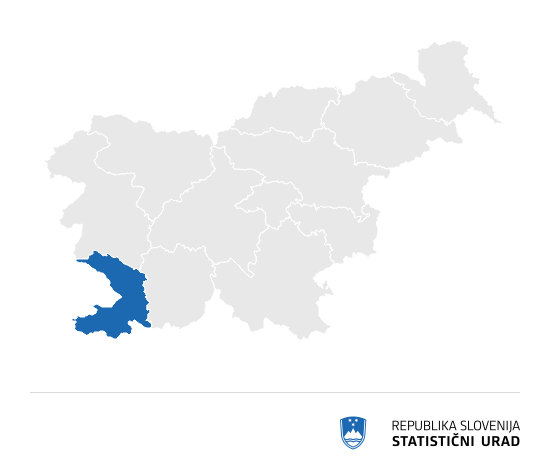 regije